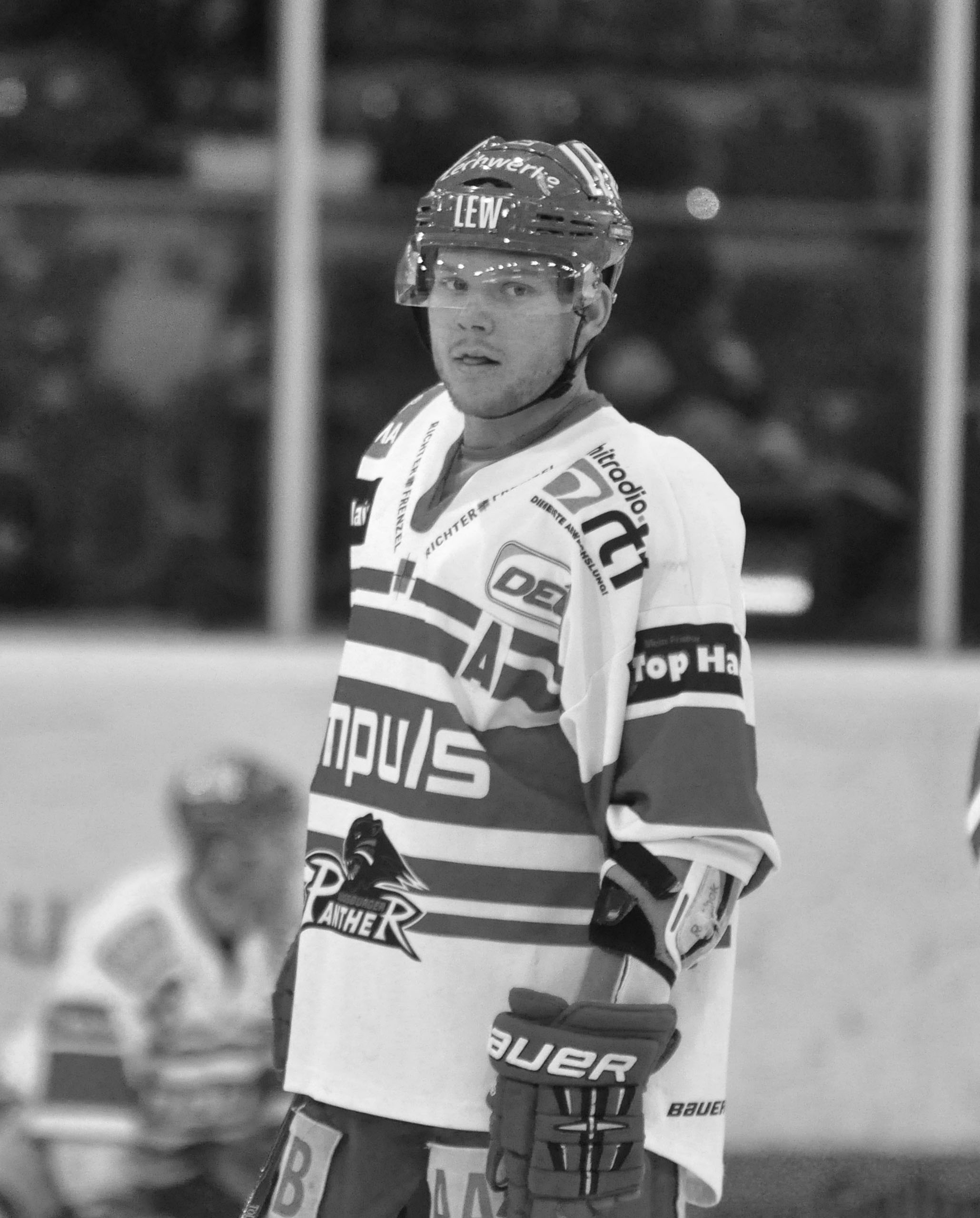 Straubing Tigers - Augsburg Panther 04.03.2012 DEL Deutsche Eishockey Liga